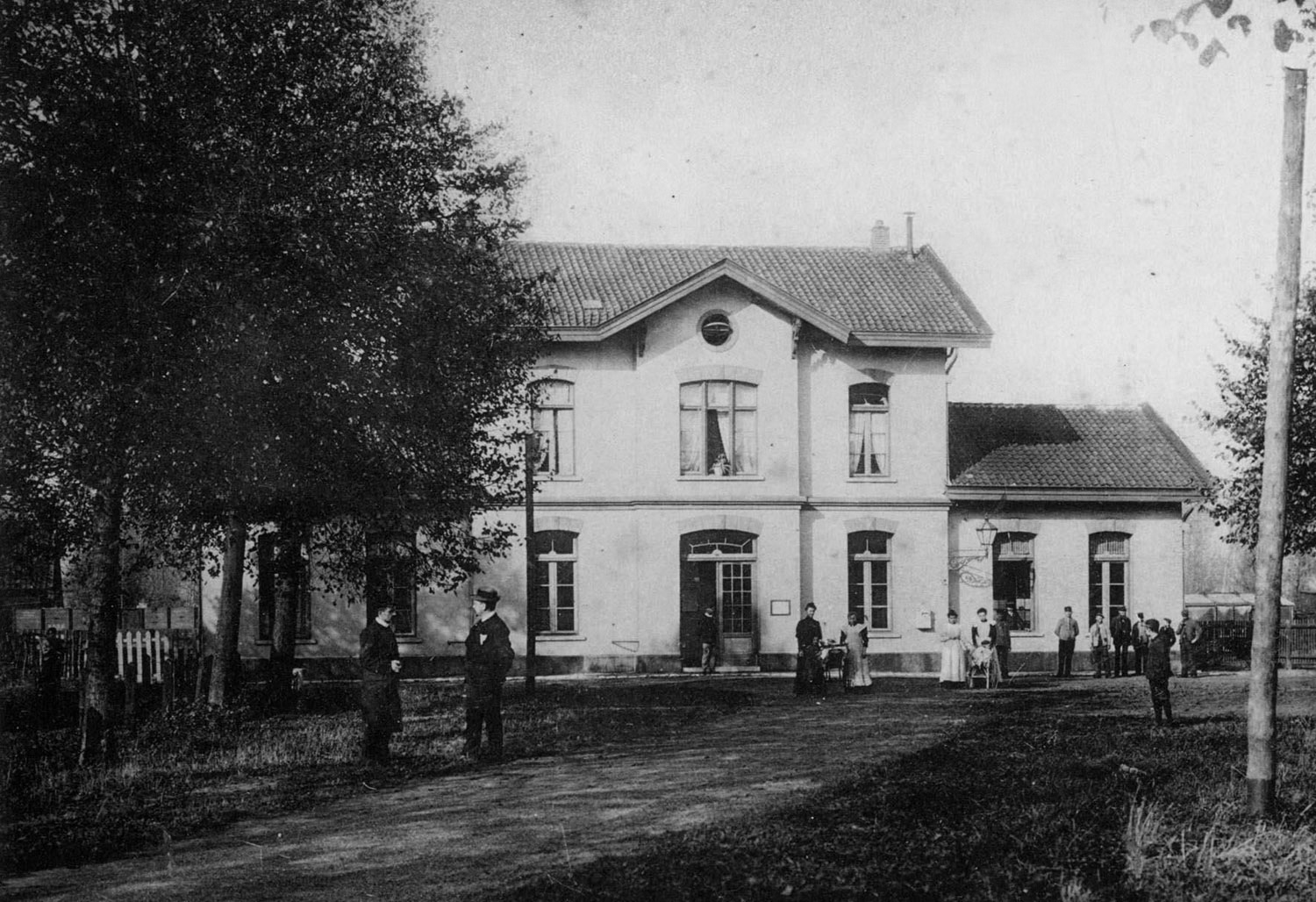 Voormalig station van de Nederlandse Spoorwegen aan de Parallelweg Zuid in Veghel. Het N.S. station en perron lag aan de spoorlijn Boxtel - Wesel (Duits lijntje). Het station werd in 1965 afgebroken.